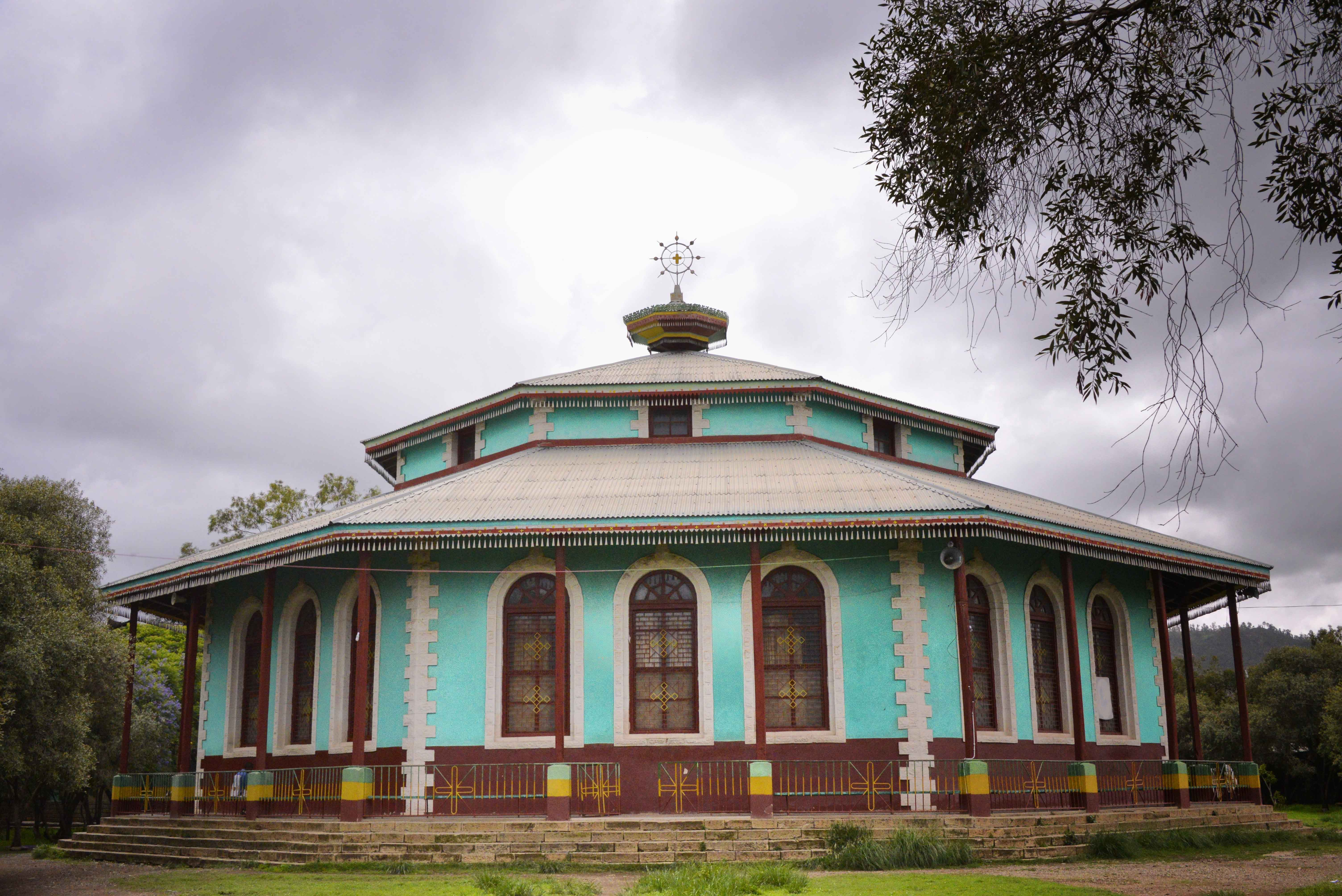 Adigrat